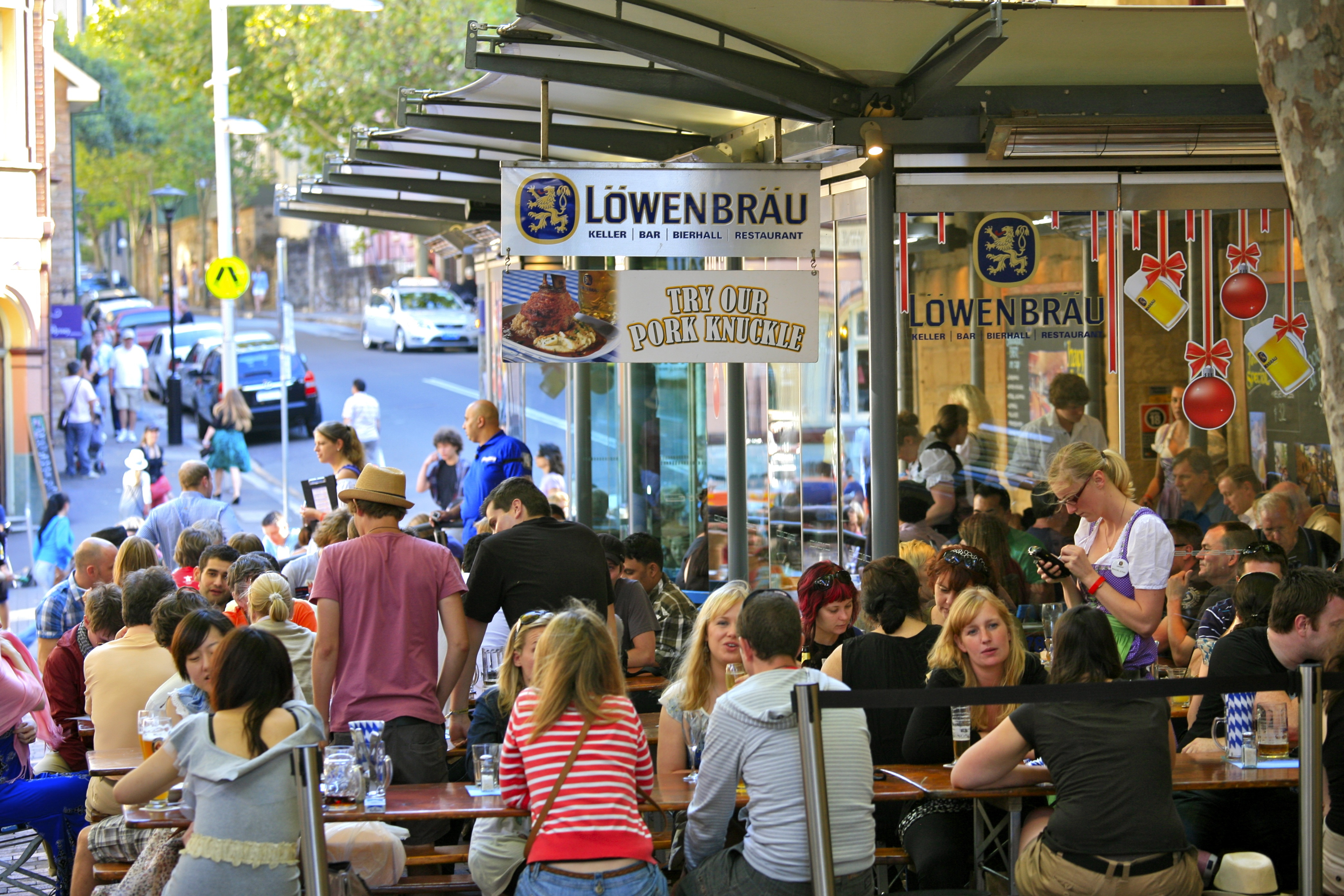 Lowenbrau Restaurant, The Rocks